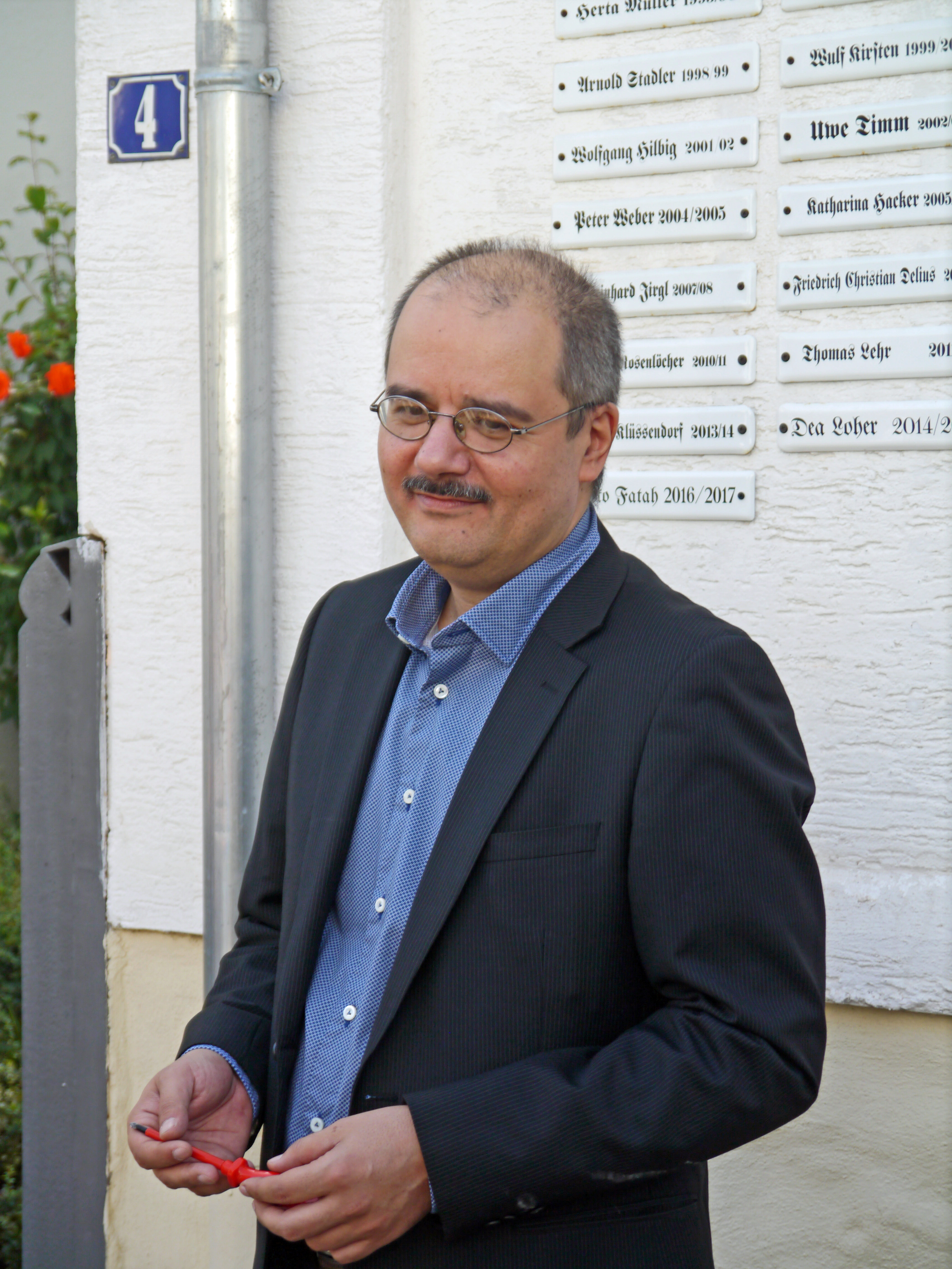 Sherko Fatah, am 2. September 2016, vor dem Stadtschreiberhaus in Bergen (Frankfurt-Bergen-Enkheim), An der Oberpforte 4.